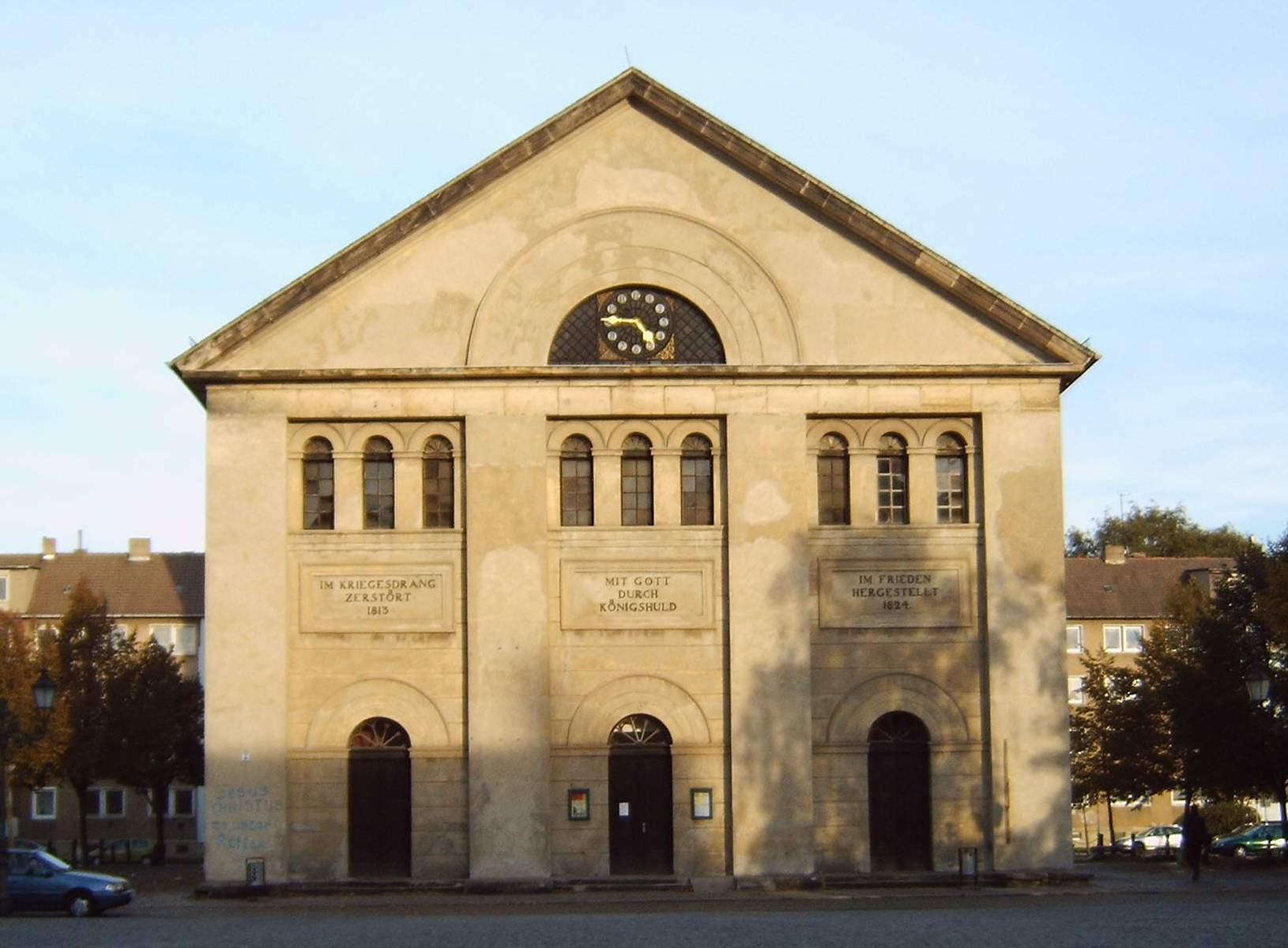 Nicolaikirche in Magdeburg-Neue Neustadt, Westseite